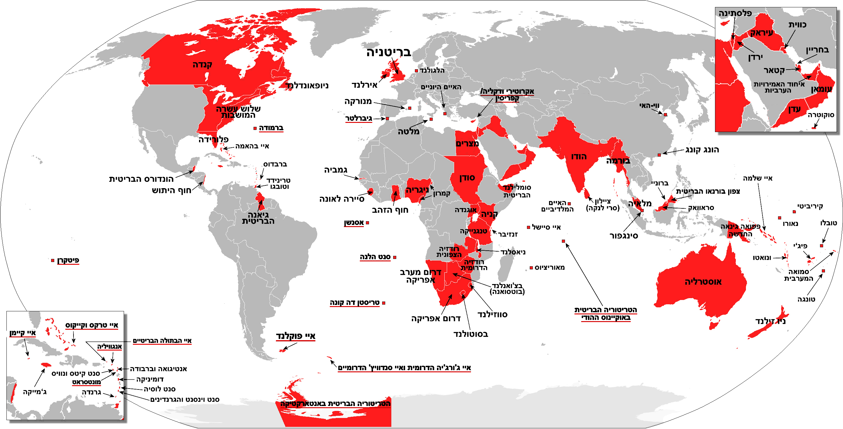 השטחים שבזמן זה או אחר היו בשליטת האימפריה הבריטית. השטחים הבריטיים שמעבר לים מודגשים בקו אדום.